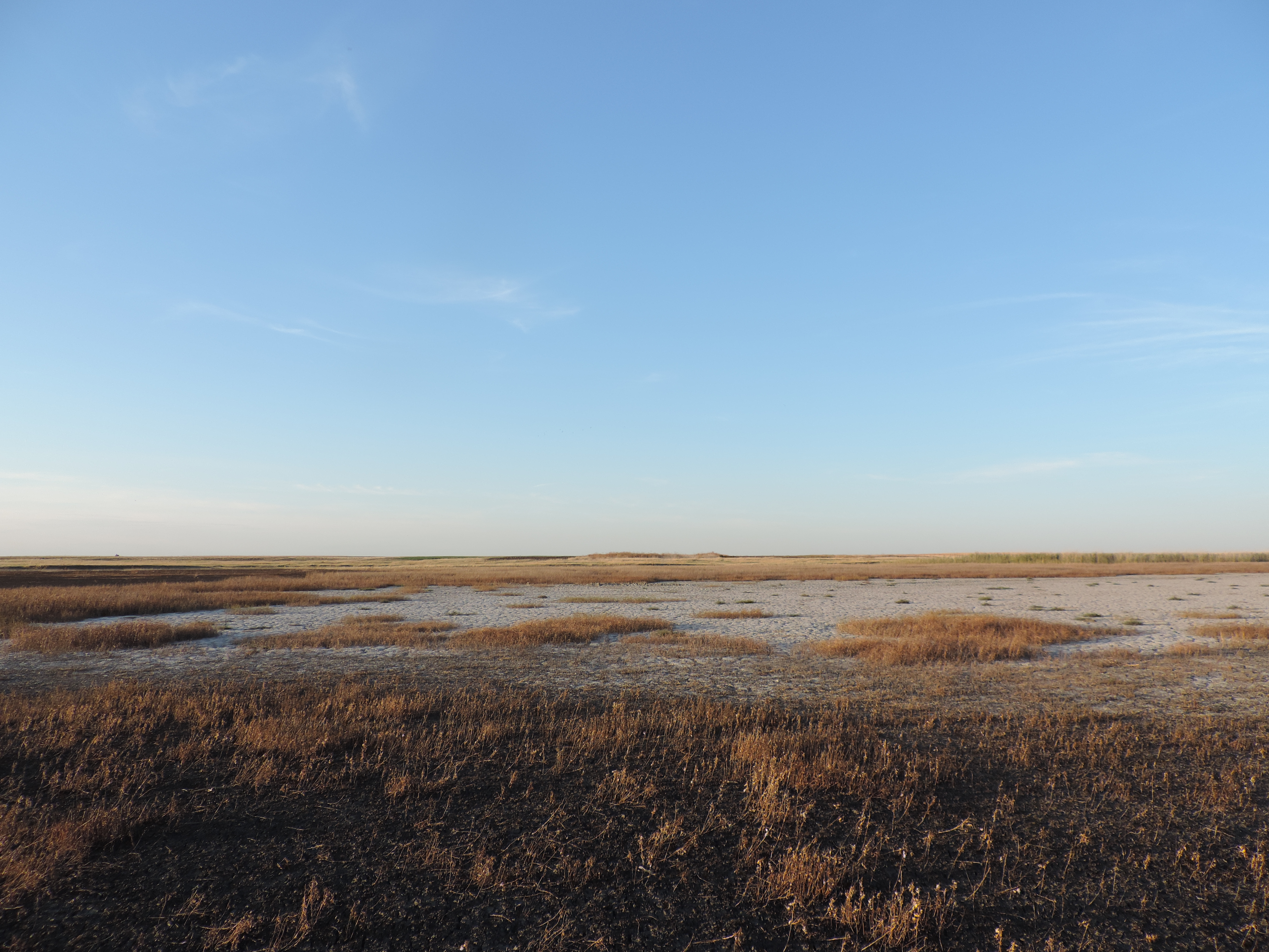 Slatinsko stanište u zaštićenom prirodnom dobru Okanj bara.